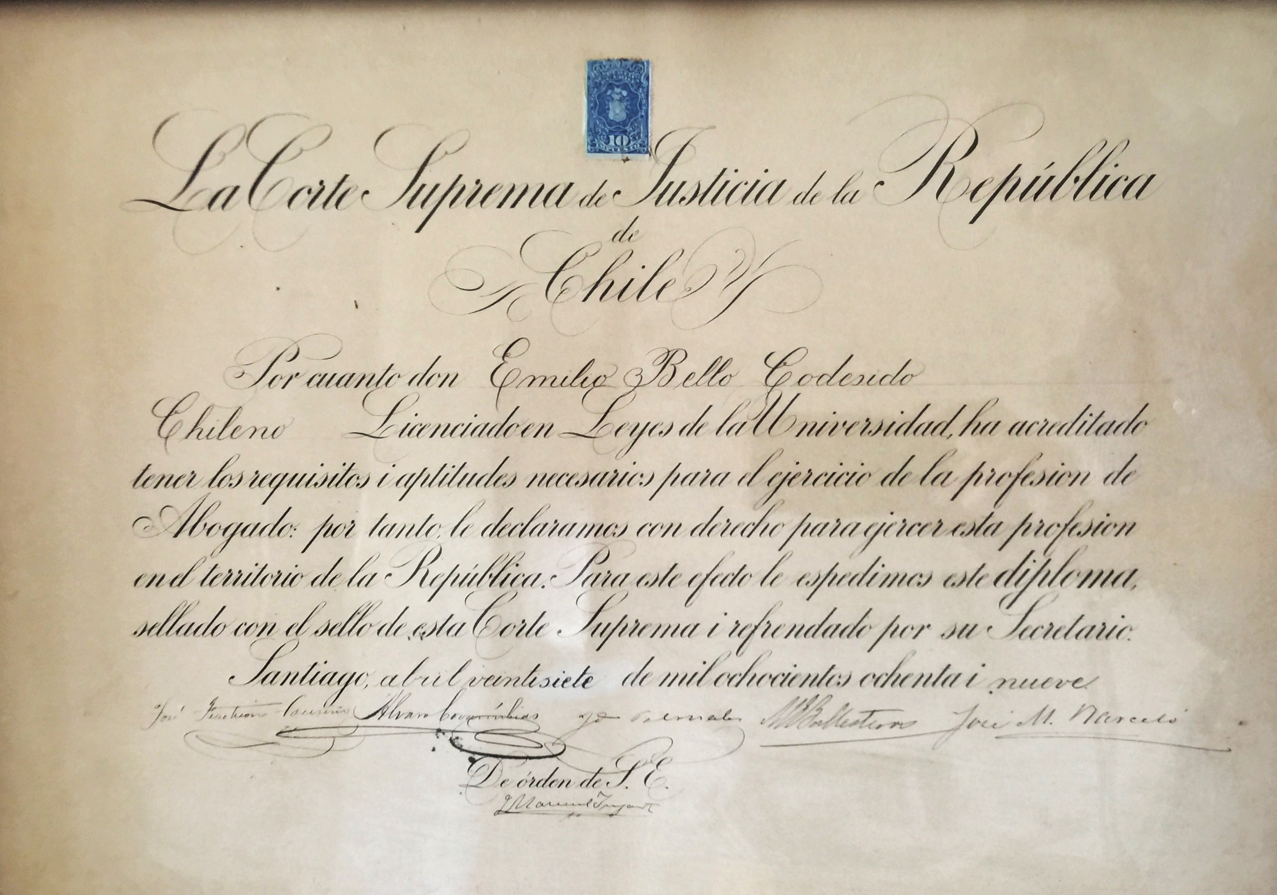 Diploma que otorga la profesión de abogado el 27 de abril de 1889 a Emilio Bello Codesido